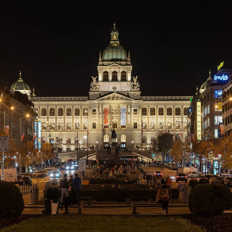 Veduta serale del museo nazionale di Praga, 5 novembre 2018